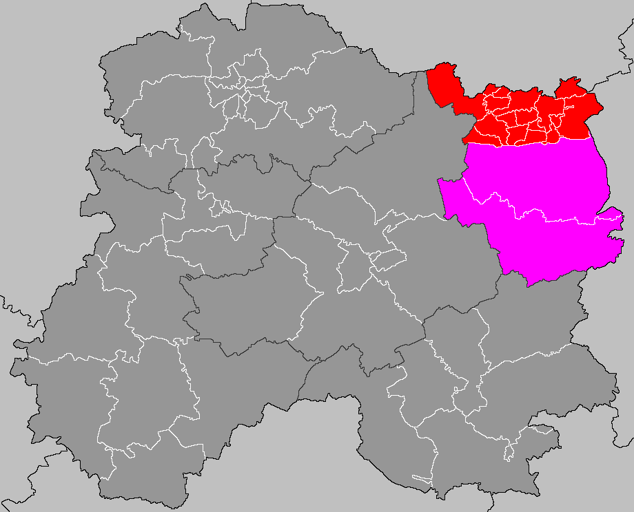 Localisation du canton de Ville-sur-Tourbe